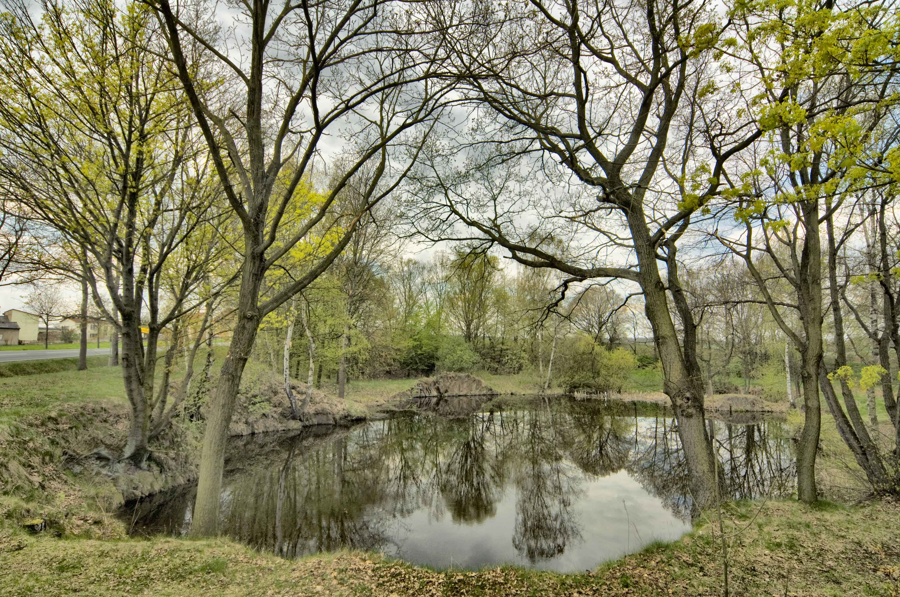 Der ehemalige Steinbruch von Lampersdorf, Gemeinde Wermsdorf in Sachsen